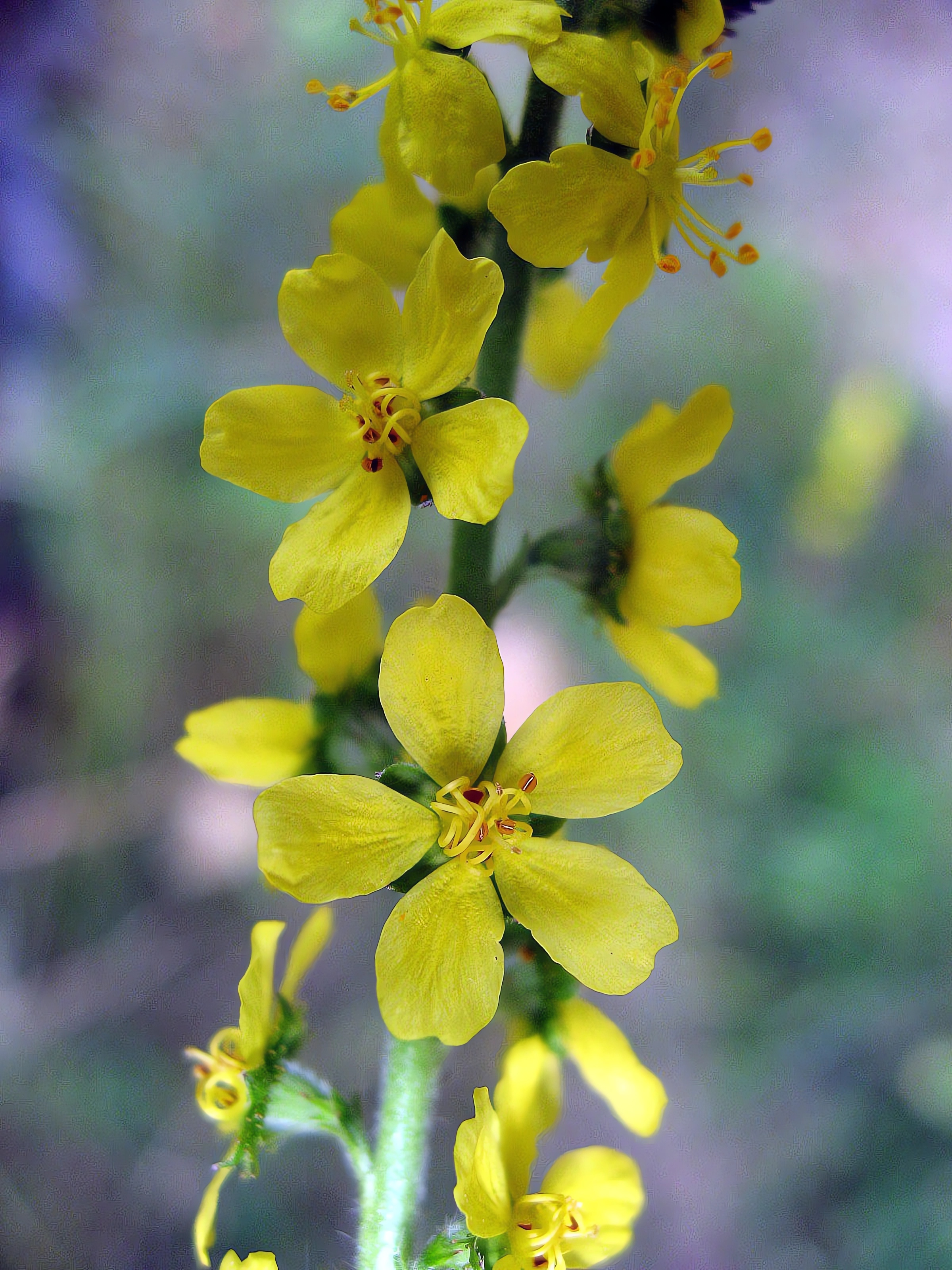 Gemeiner Odermennig (Agrimonia eupatoria)